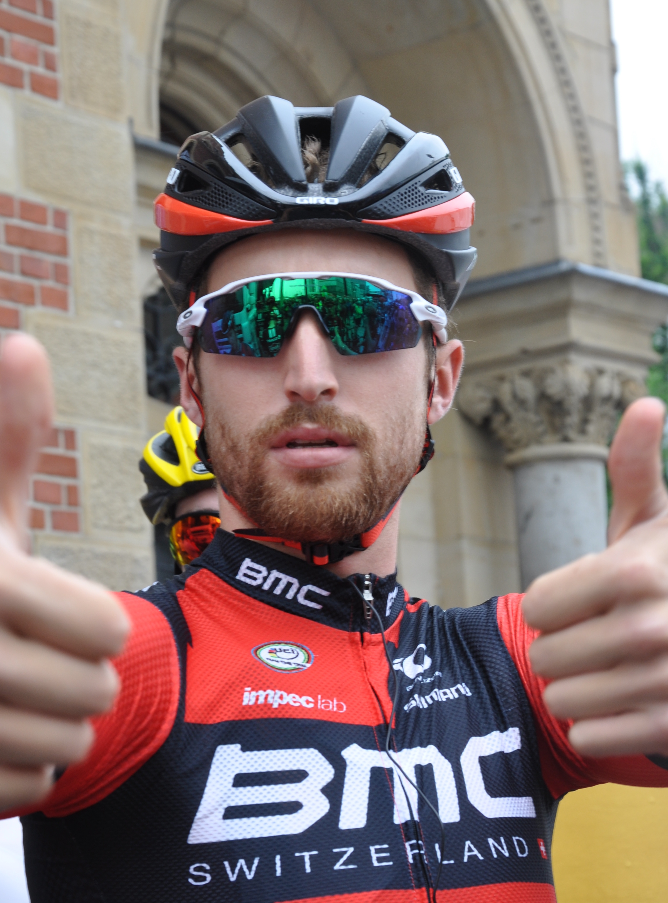 Taylor Phinney, US-amerikanischer Radrennfahrer